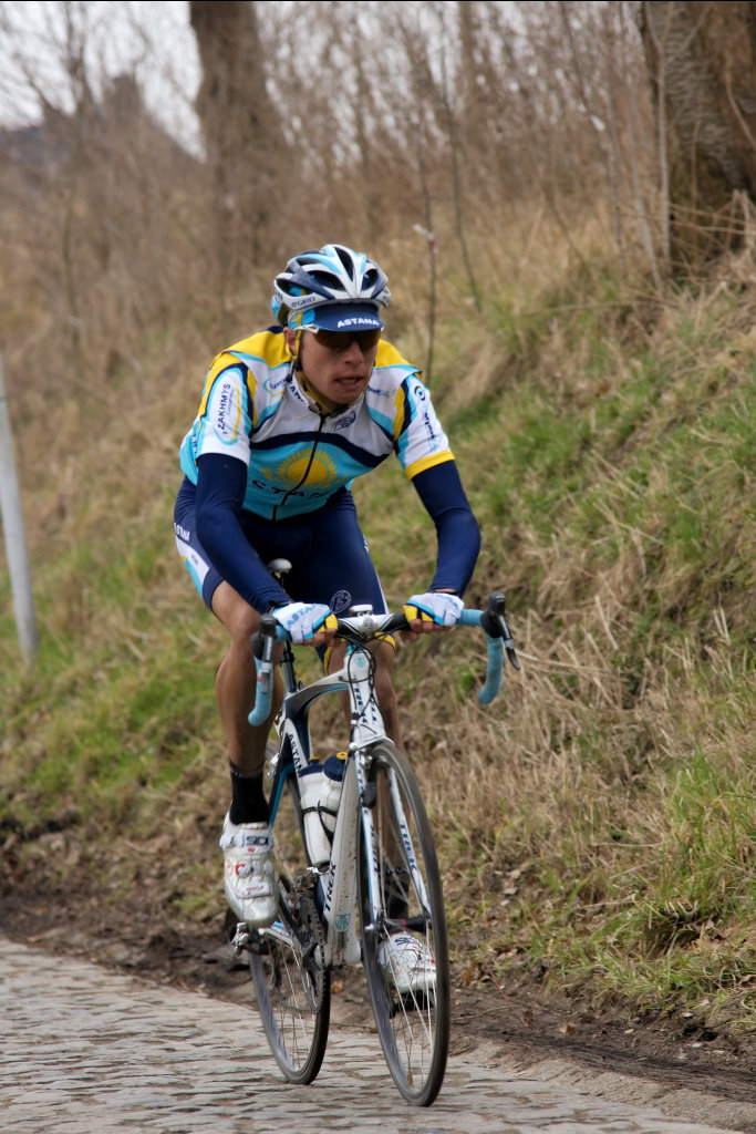 Sergey Renev, Omloop Het Nieuwsblad 2009